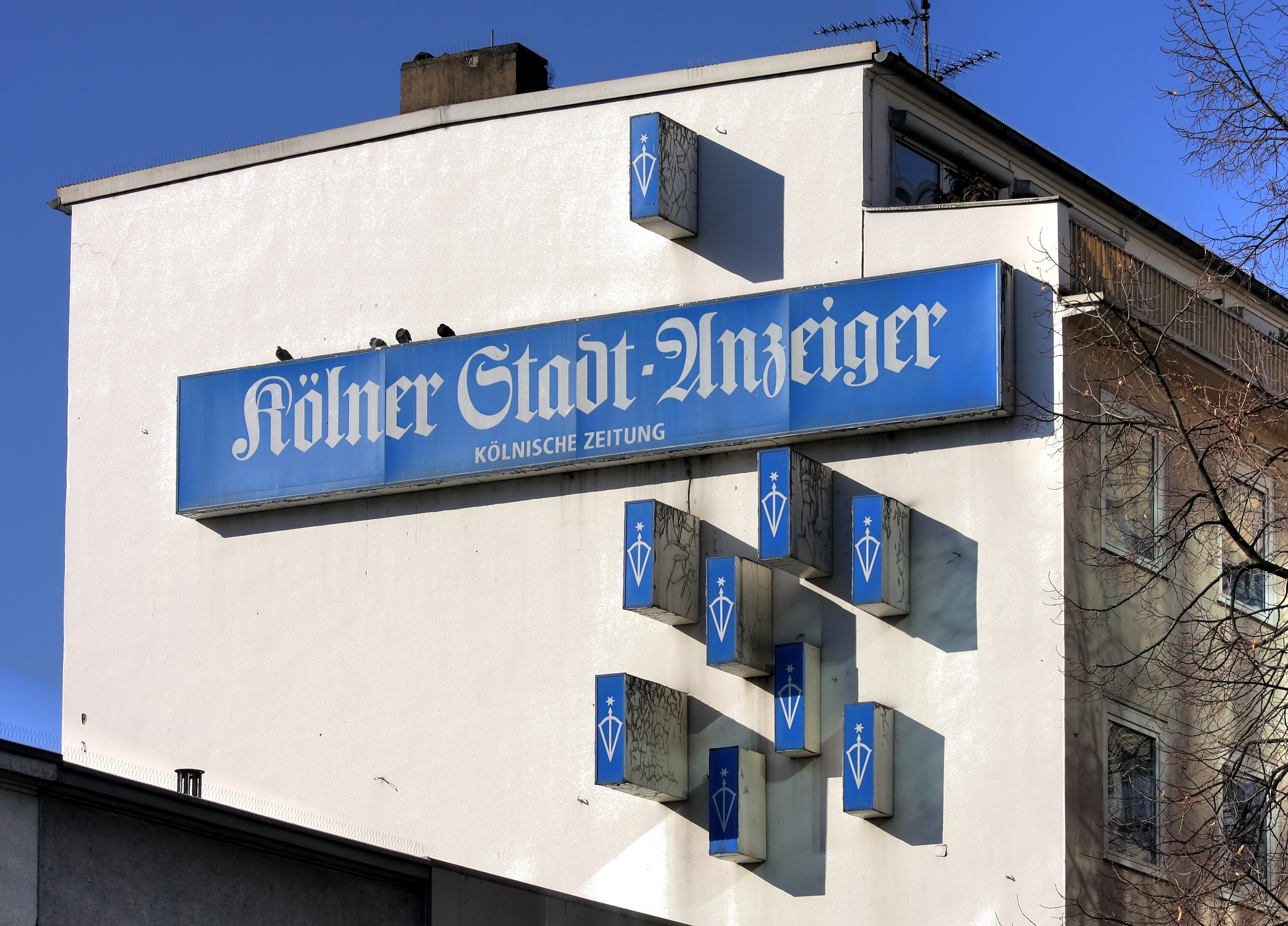 Leuchtreklame für den Kölner Stadt-Anzeiger an einer Hauswand Kreuzung Breite Straße/Neue Langgasse, Köln